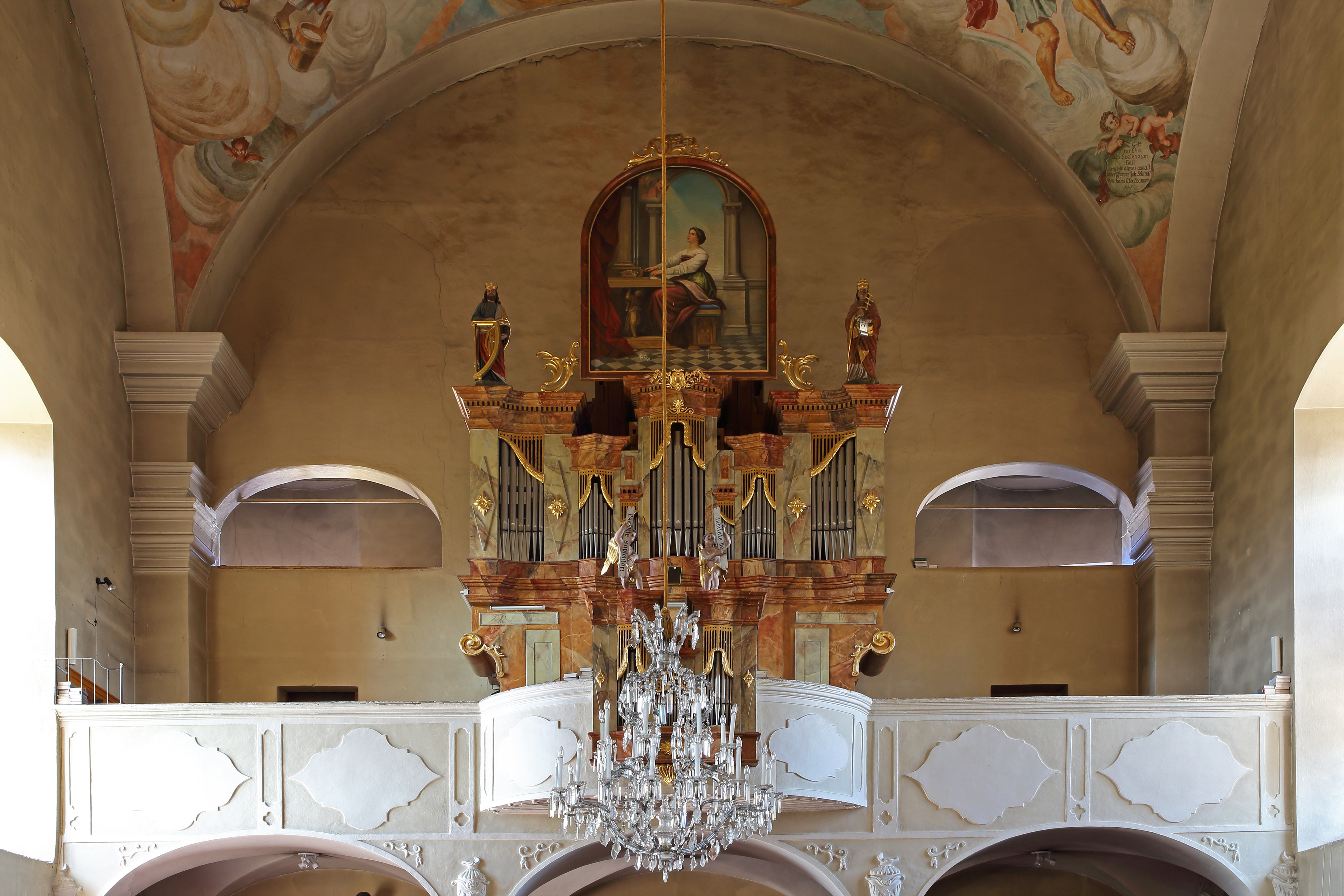 Orgel in der kath. Pfarrkirche hl. Ägydius in Arbesbach